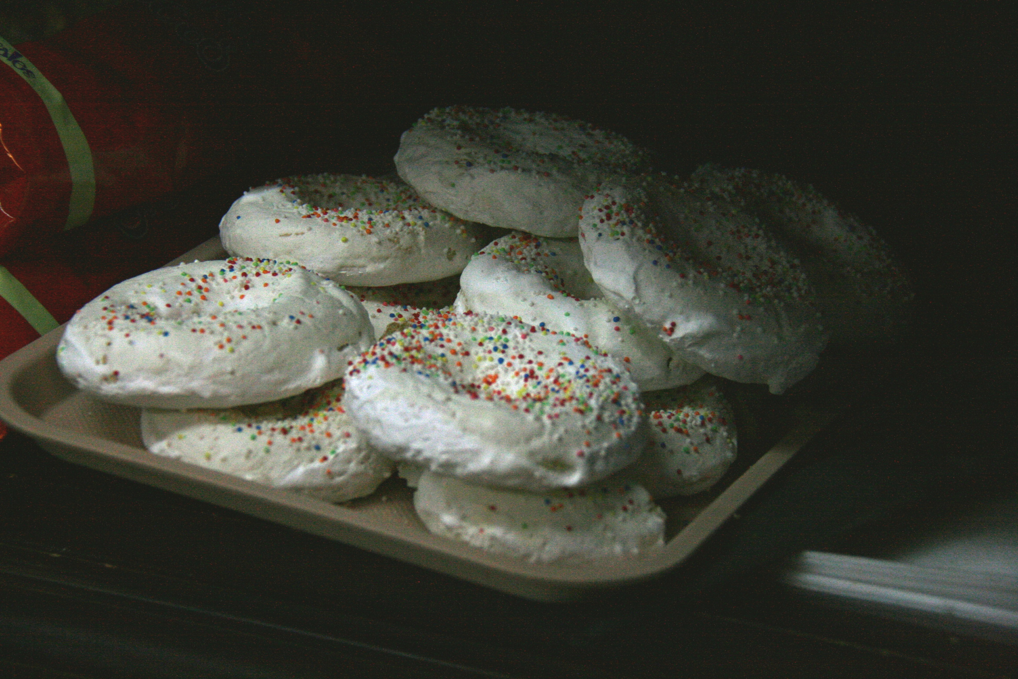 Rosquillas blancas